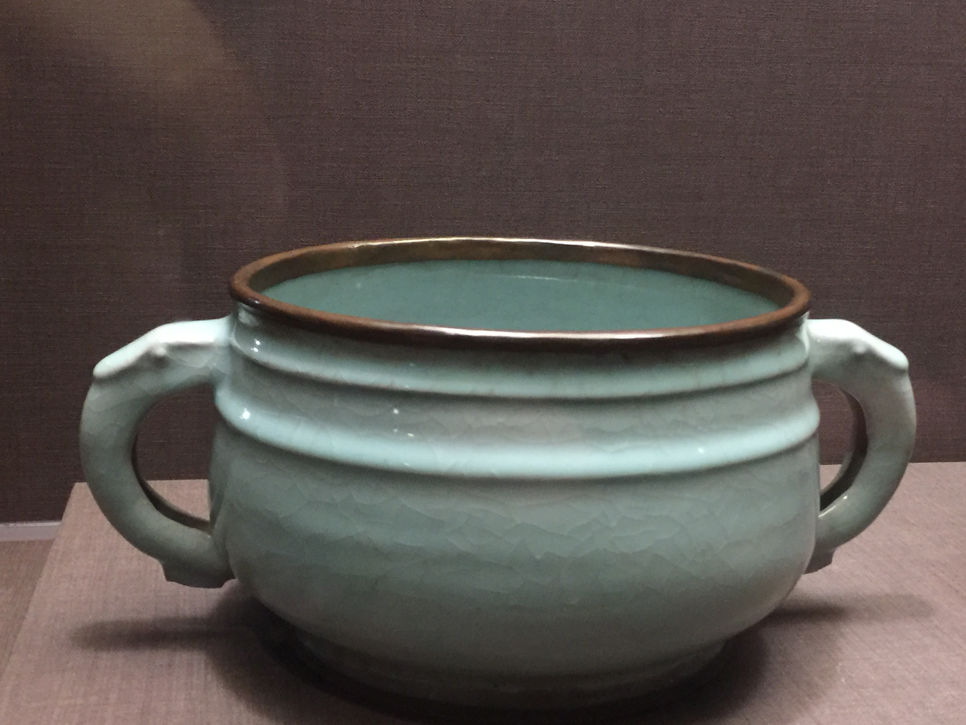 中文（台灣）: 南宋官窯青瓷簋的正面圖